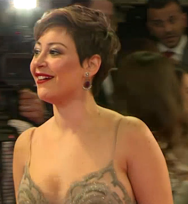 منة شلبي في مهرجان دبي السينمائي 2017